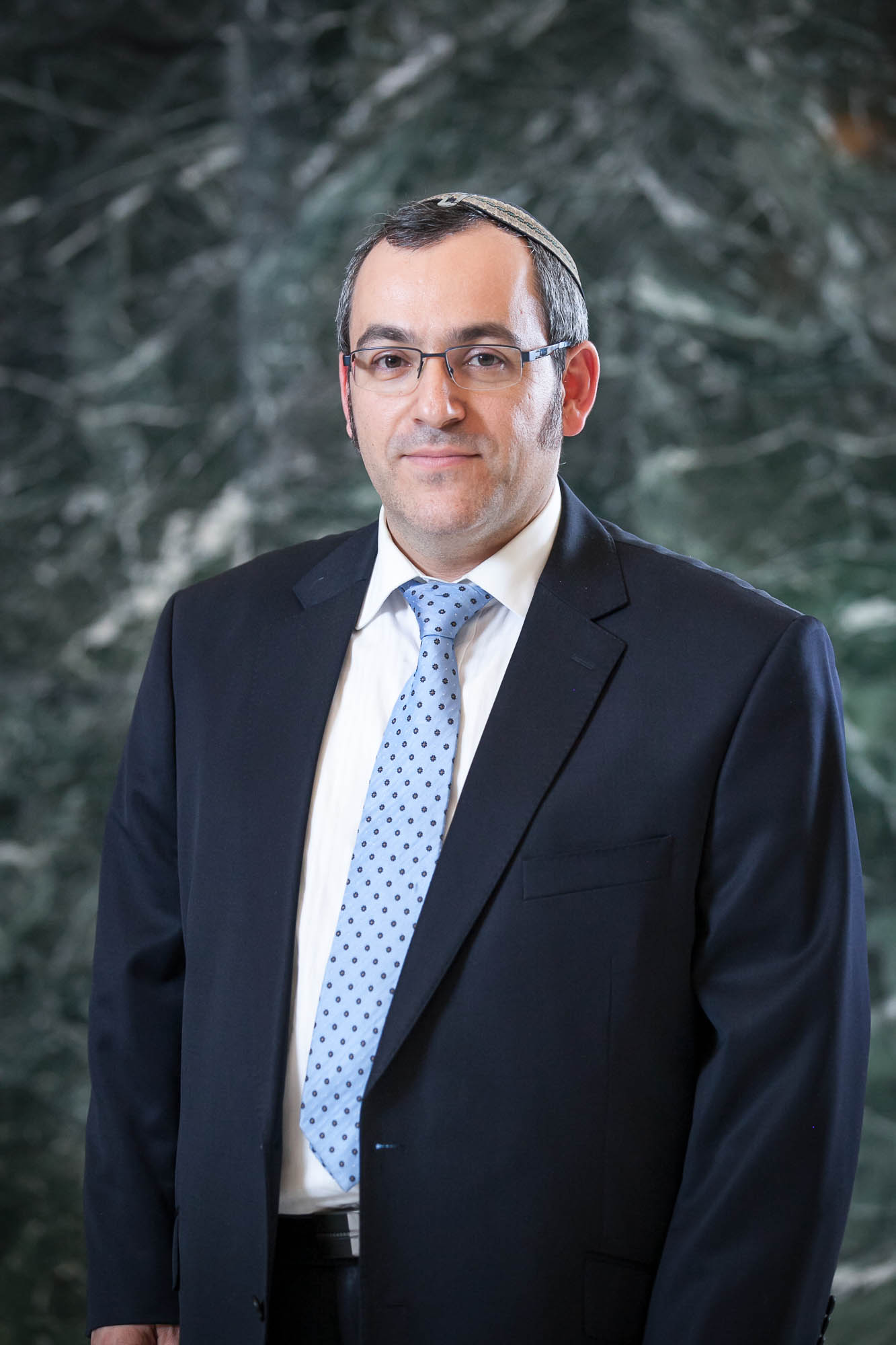 הרב אביחי אפל